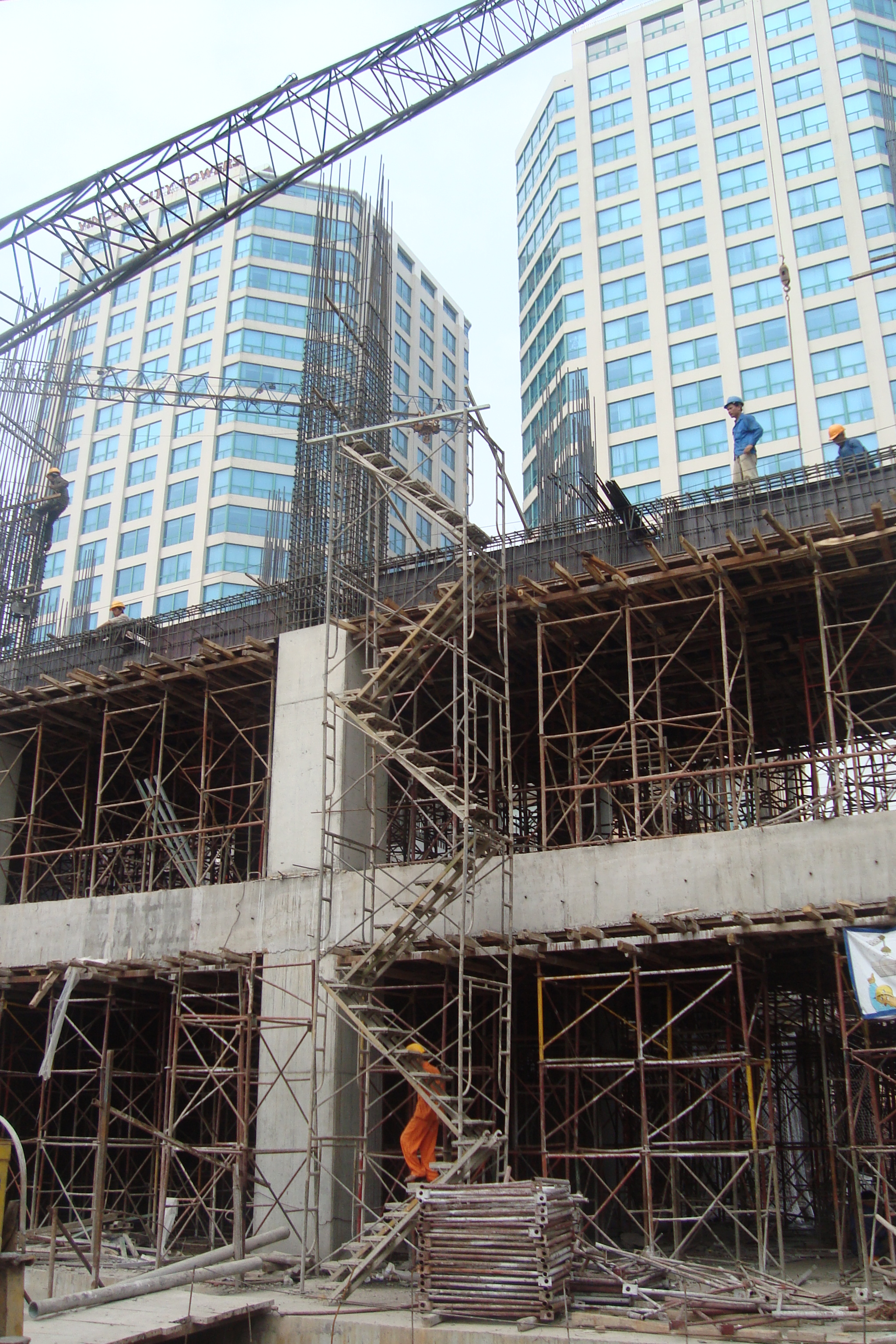 Hình tự chụp